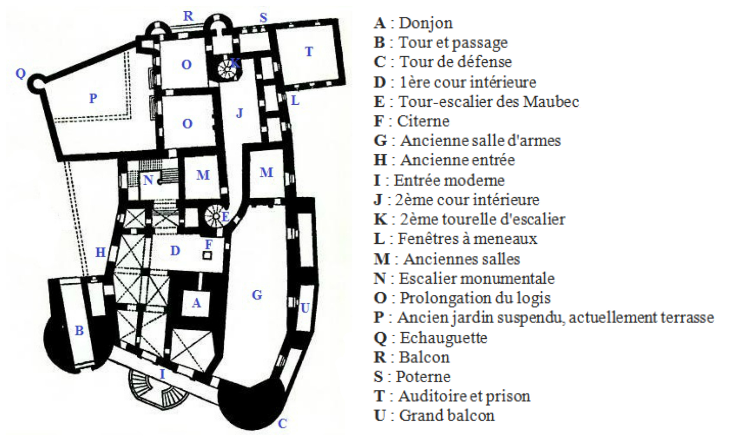 plan chateau aubenas